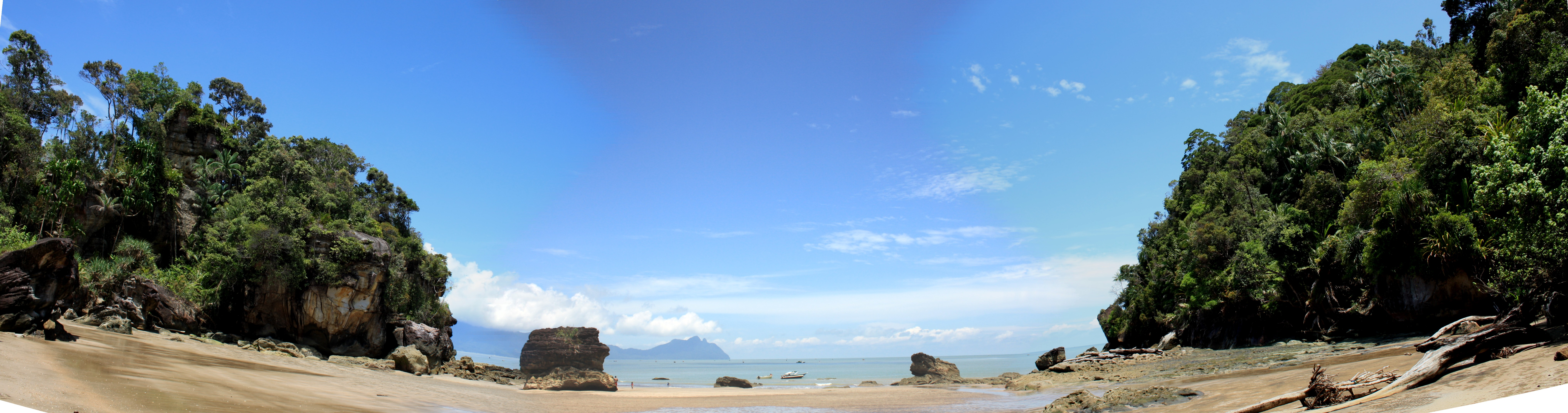 Bako